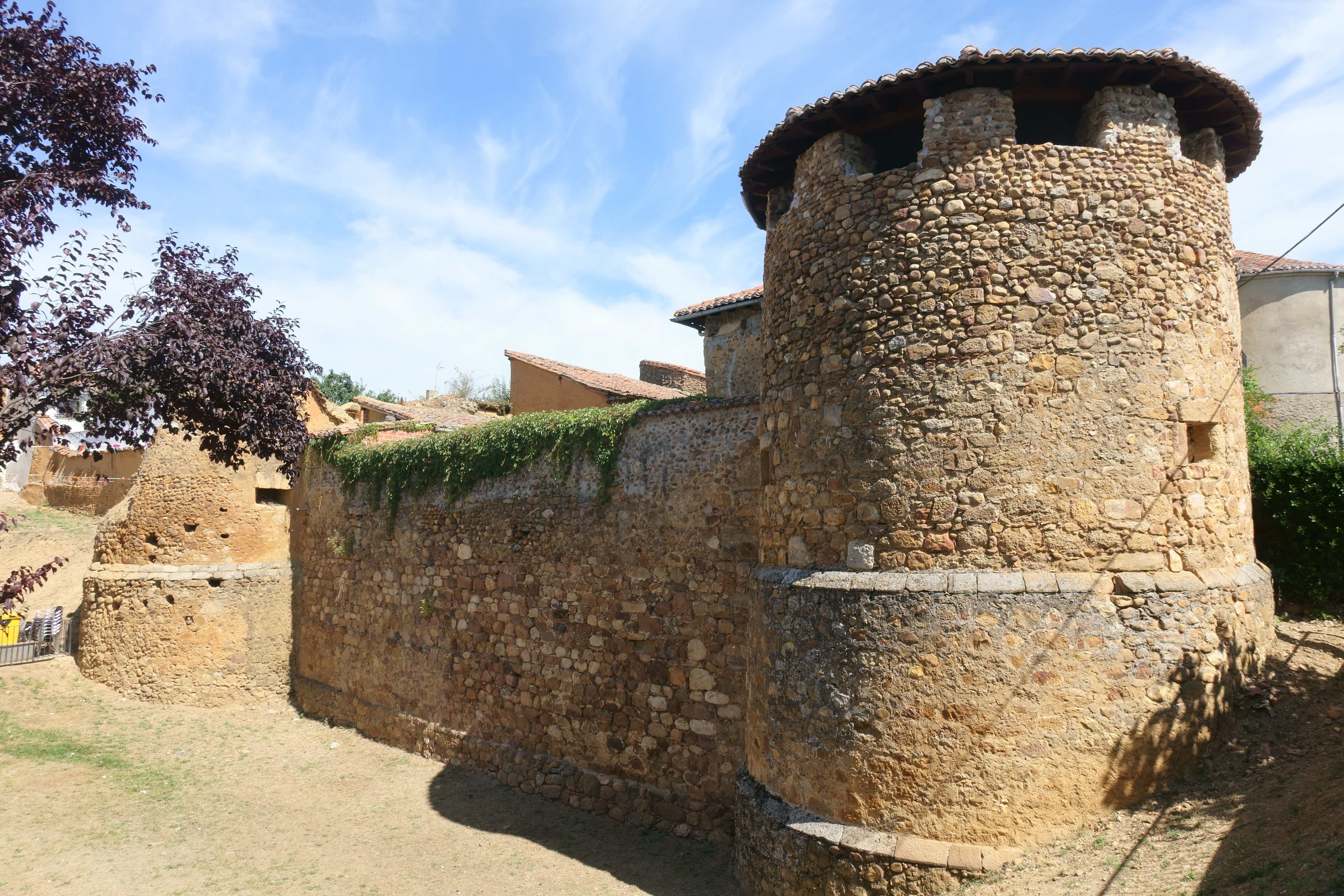 Castillo de Almanza (León, España).